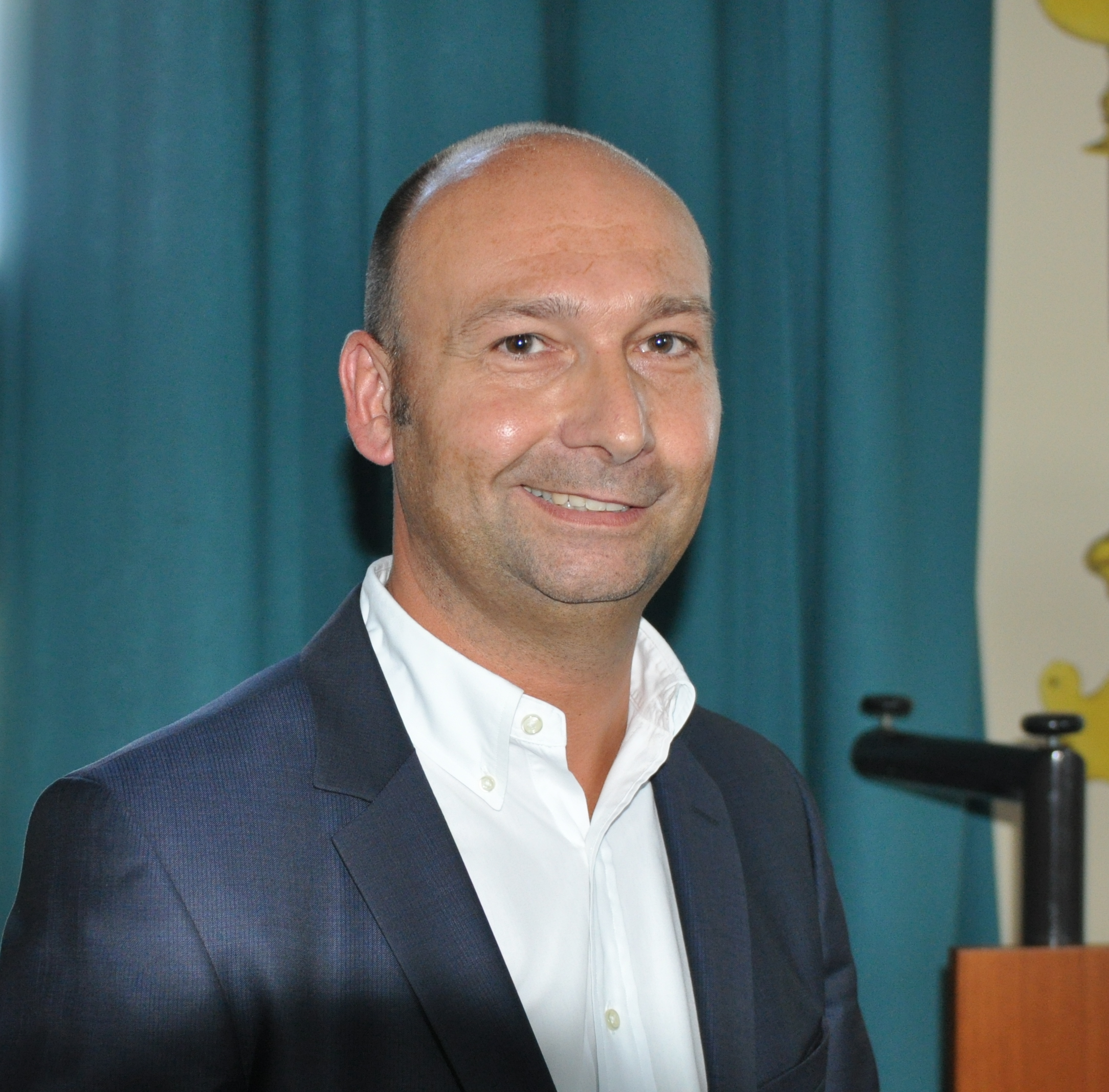 Der ehemalige Bürgermeister Stefan Freitag